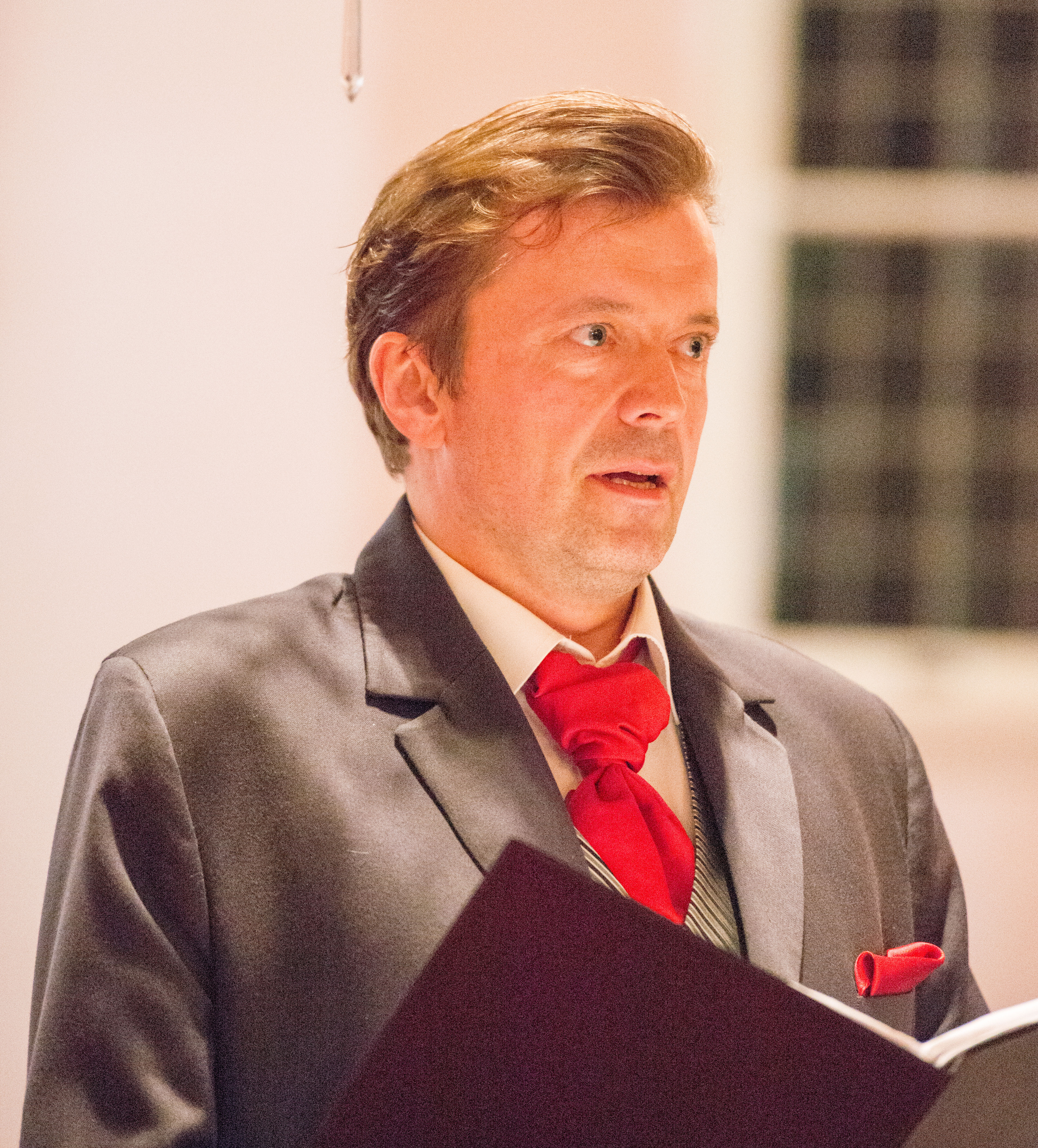 Jyrki Anttila, suomalainen oopperalaulaja